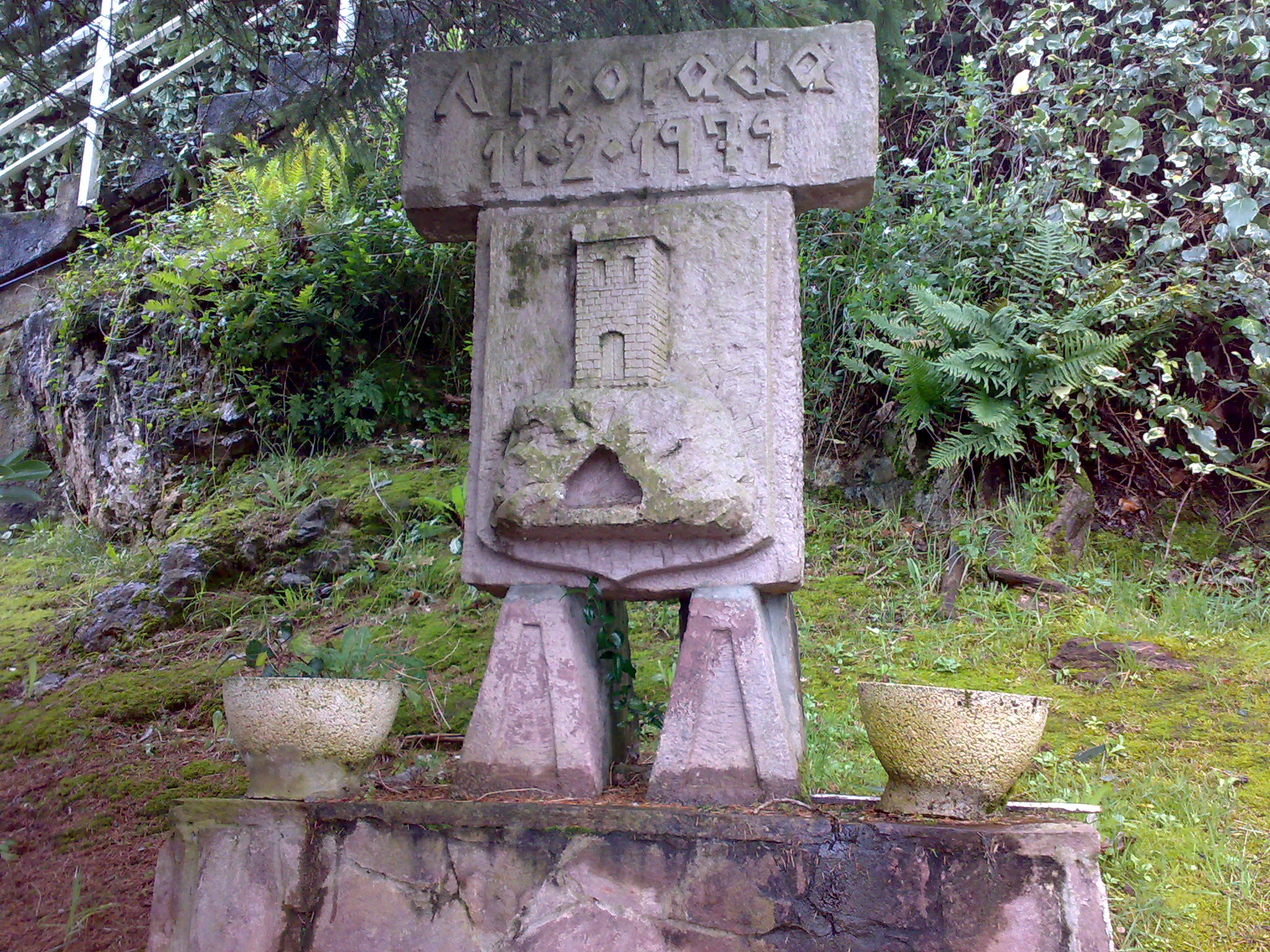 Escudo conmemorativo de la inauguración del local actual del Centro Cultural ALBORADA, en Igollo de Camargo, el 11 de febrero de 1979